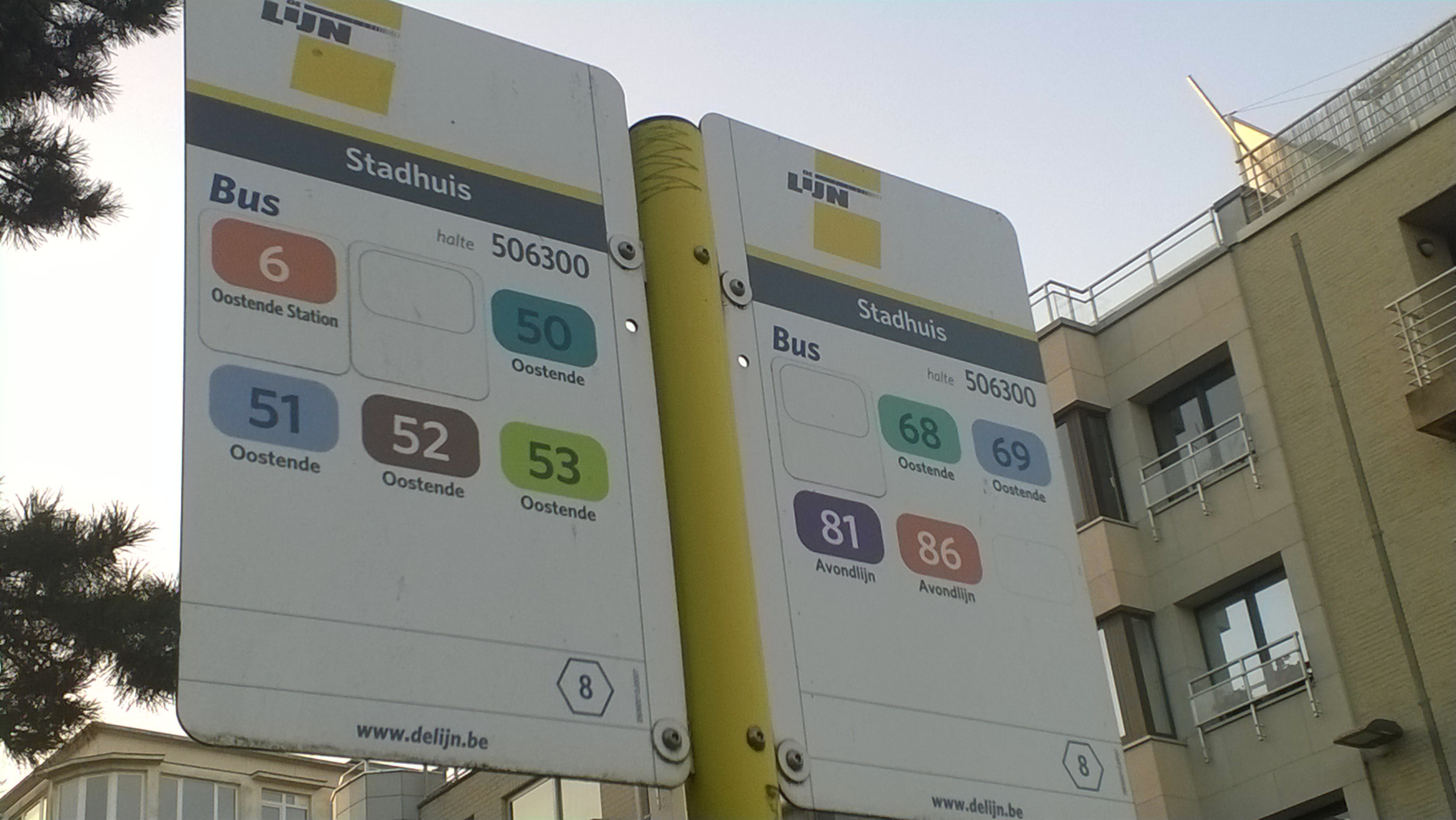 Twee halteborden van De Lijn te Oostende